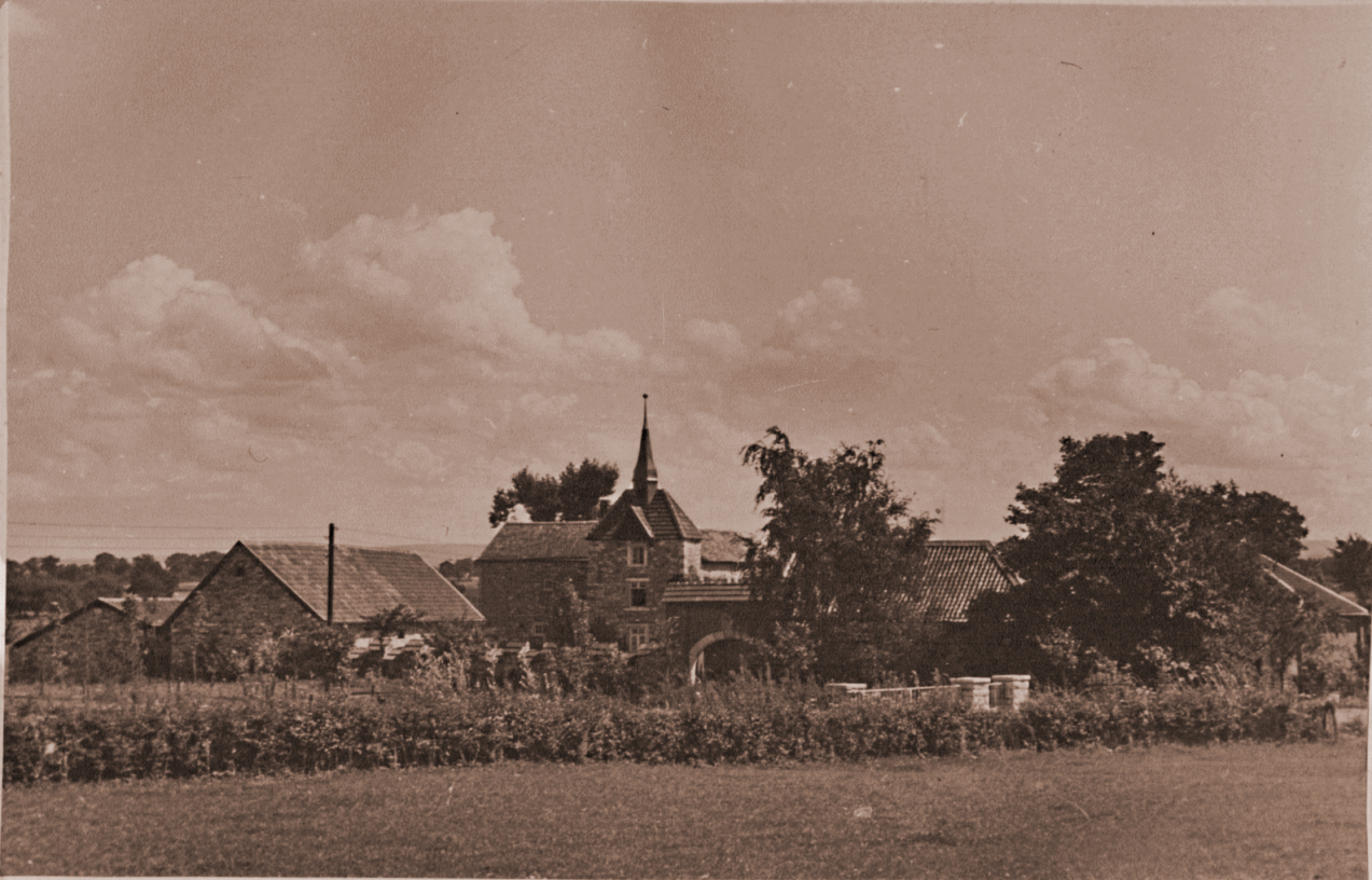 Gut Hebscheid im Jahre 1955 von Norden gesehen.